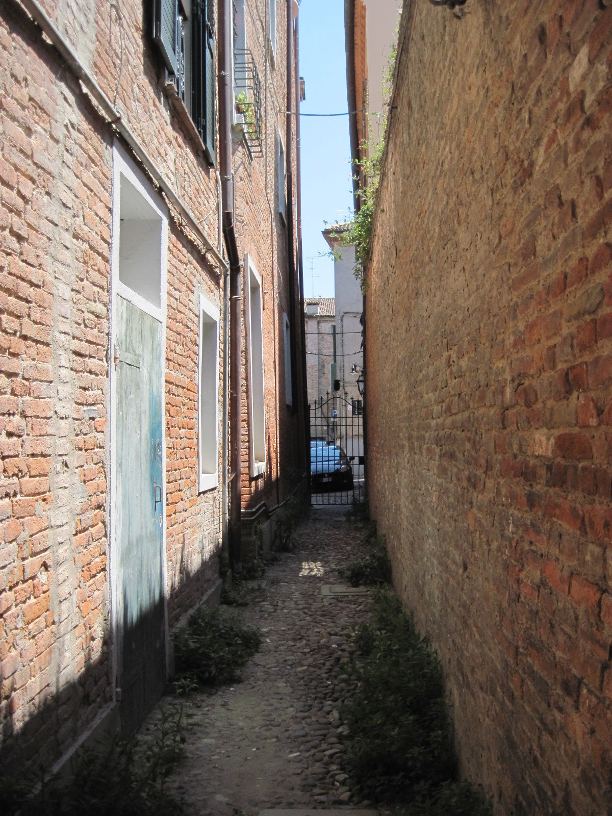 Vicolo dei Duelli 11